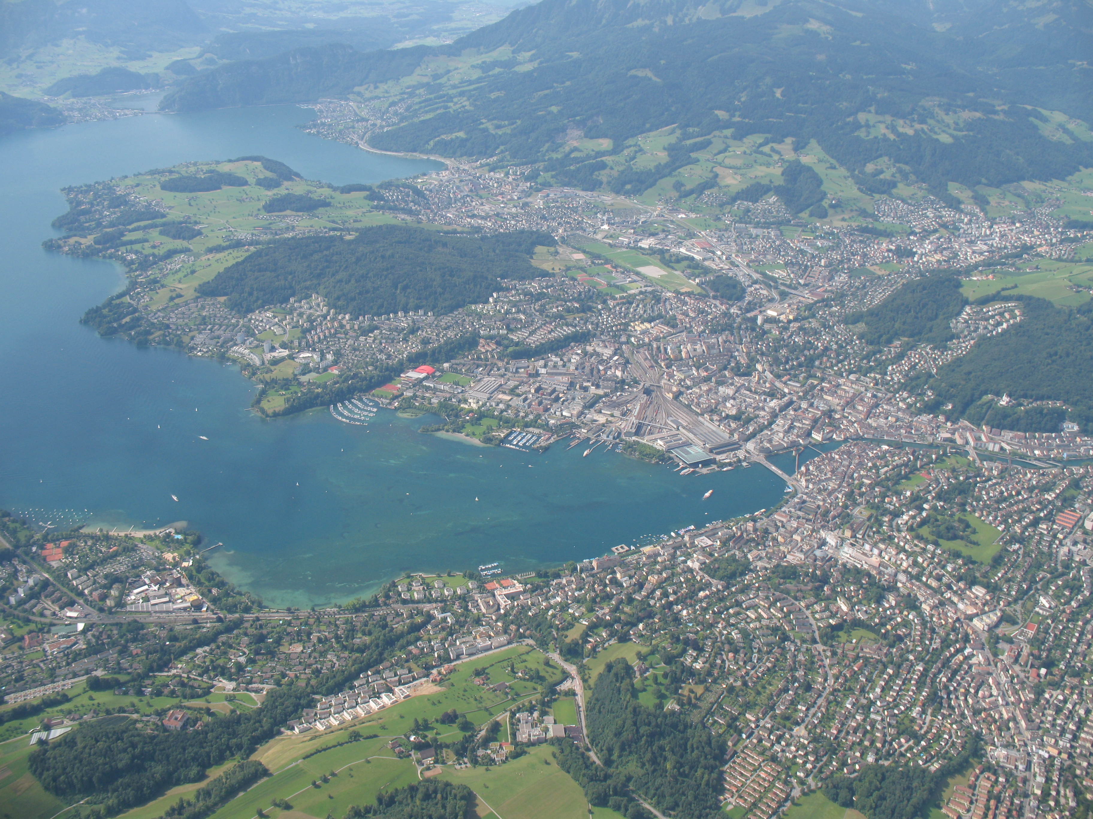 Luzern aus der Luft